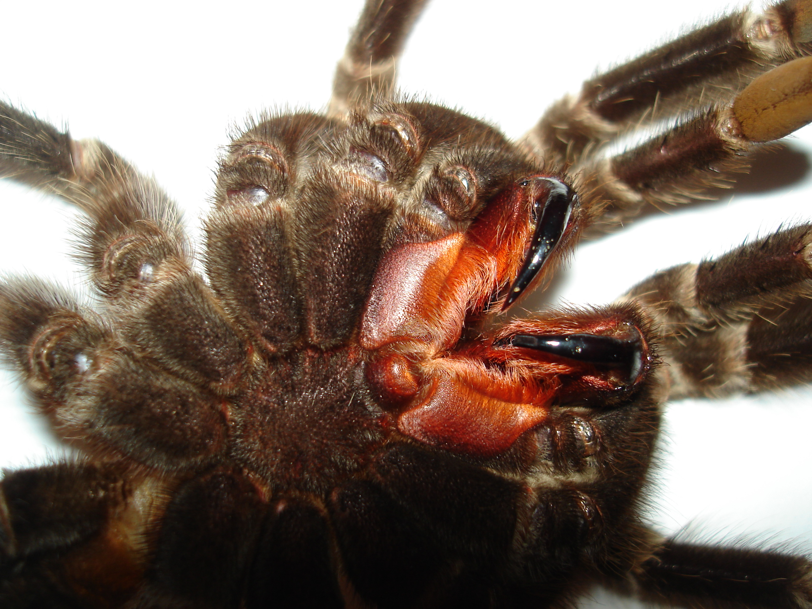 Lasiodora parahybana, adult female, chelicerae